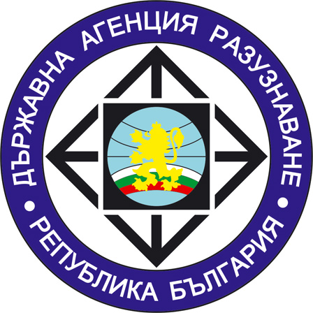 Емблема на Държавна агенция “Разузнаване”